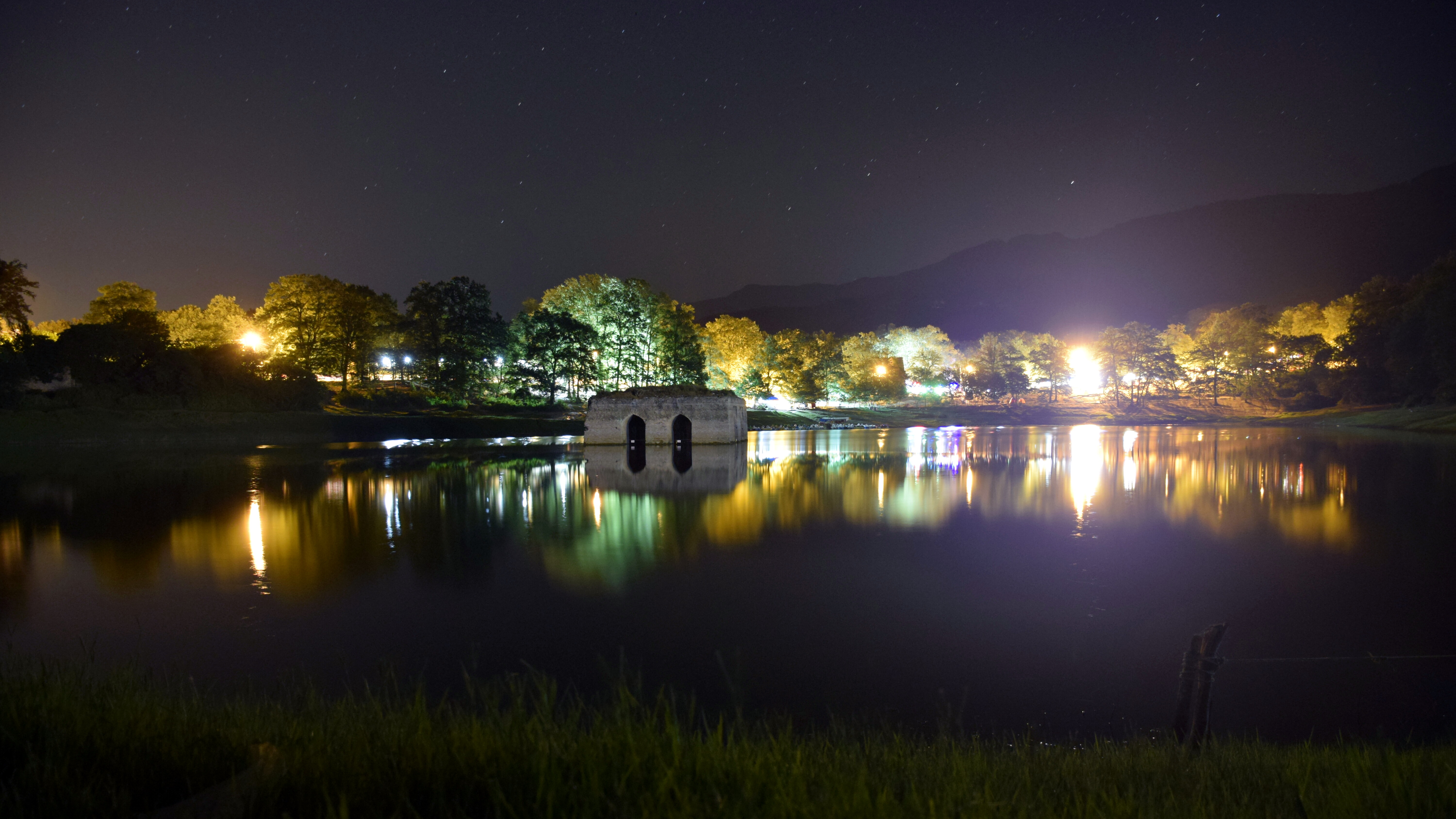 باغ عباس آباد عکس: در شب تاریخ: ۱۳۹۷/۰۴/۲۲ عکاس: رهی دهزنی